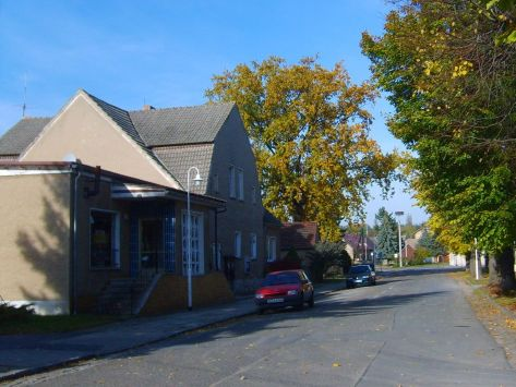 Haida